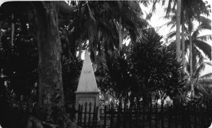 Foto. Grafmonument voor de in 1850 bij Pamangkat gesneuvelde militairen, onder wie luitenant-kolonel Sorg